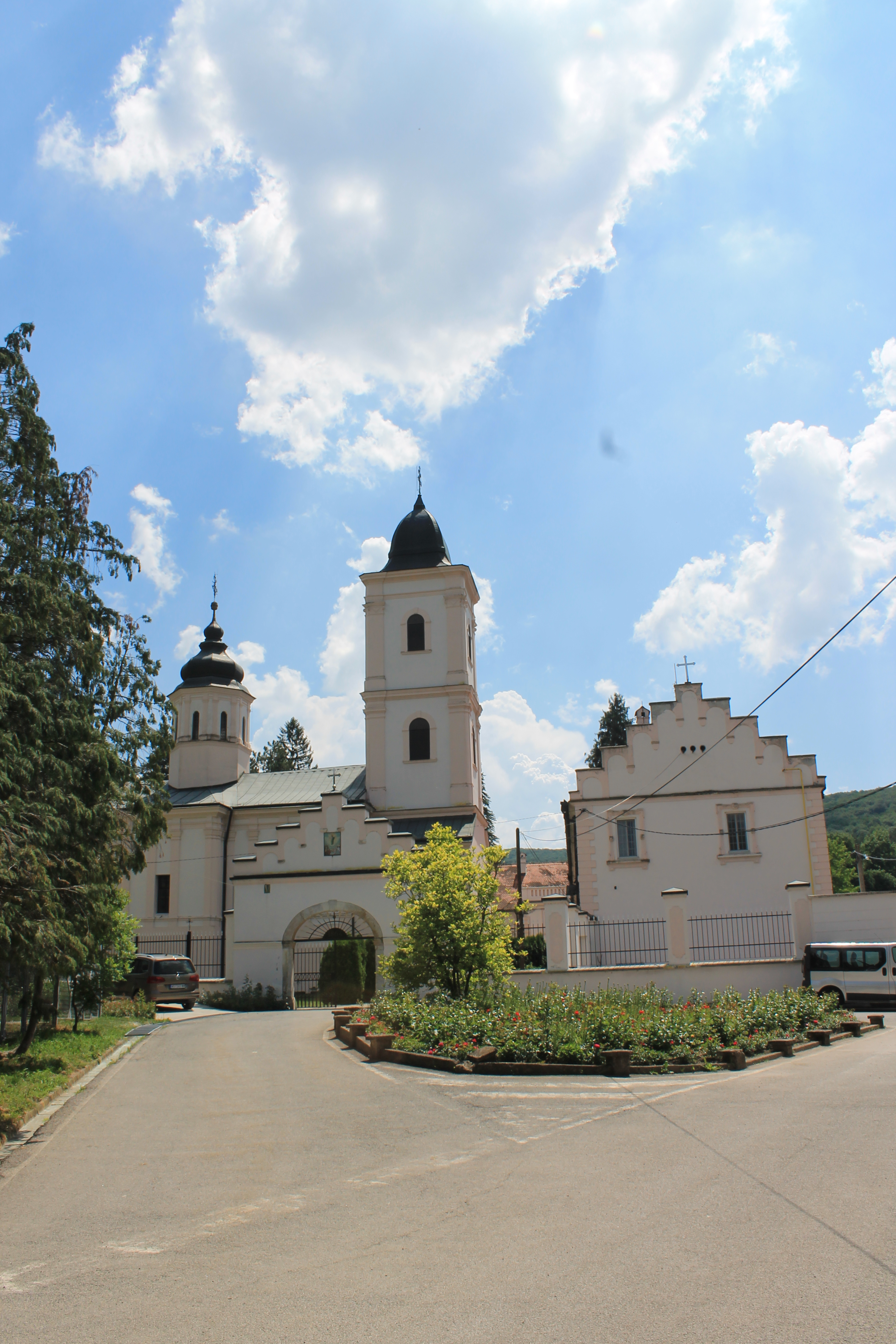 Manastir Beočin